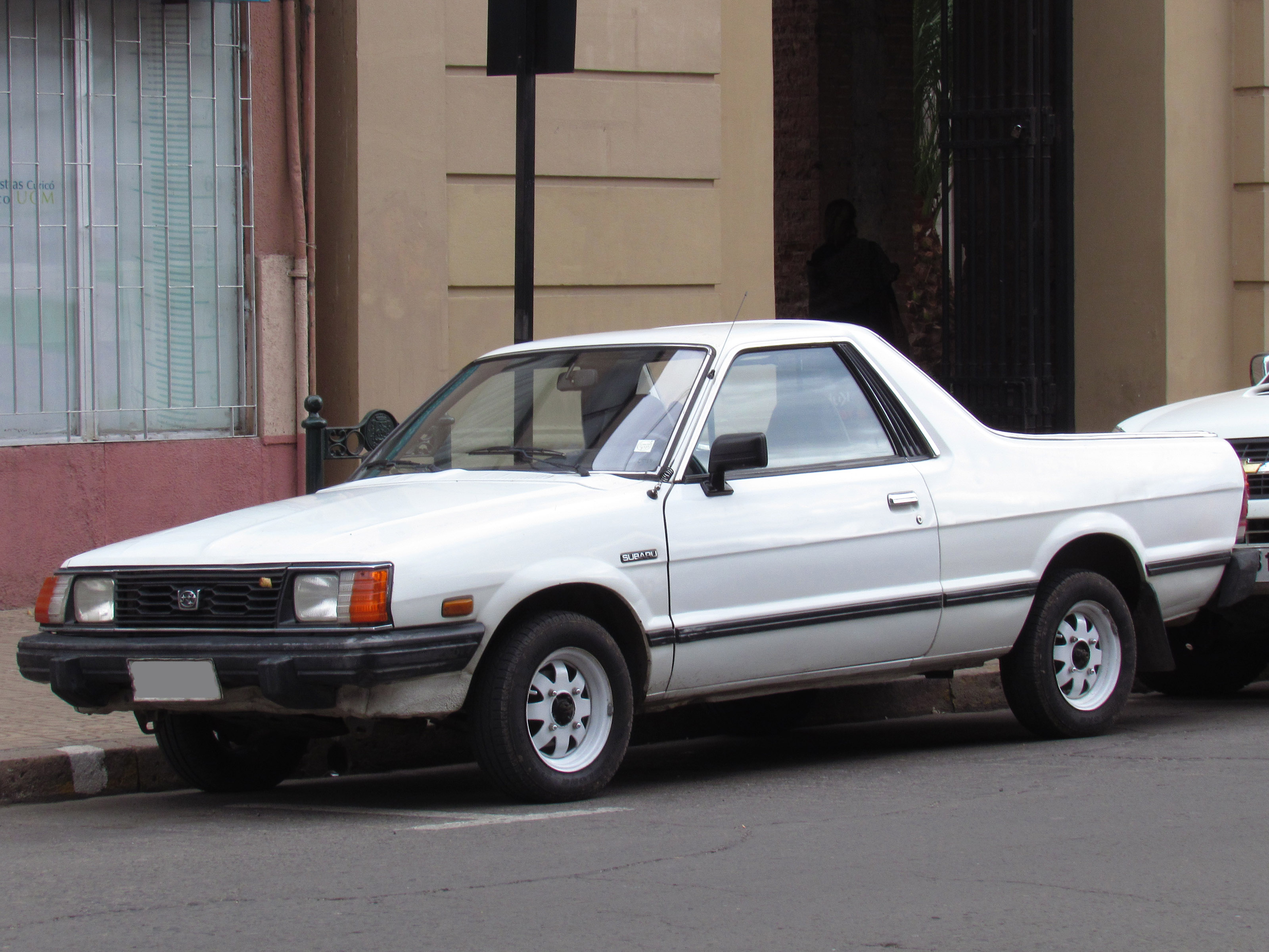 Subaru 1800 MV 4WD 1992